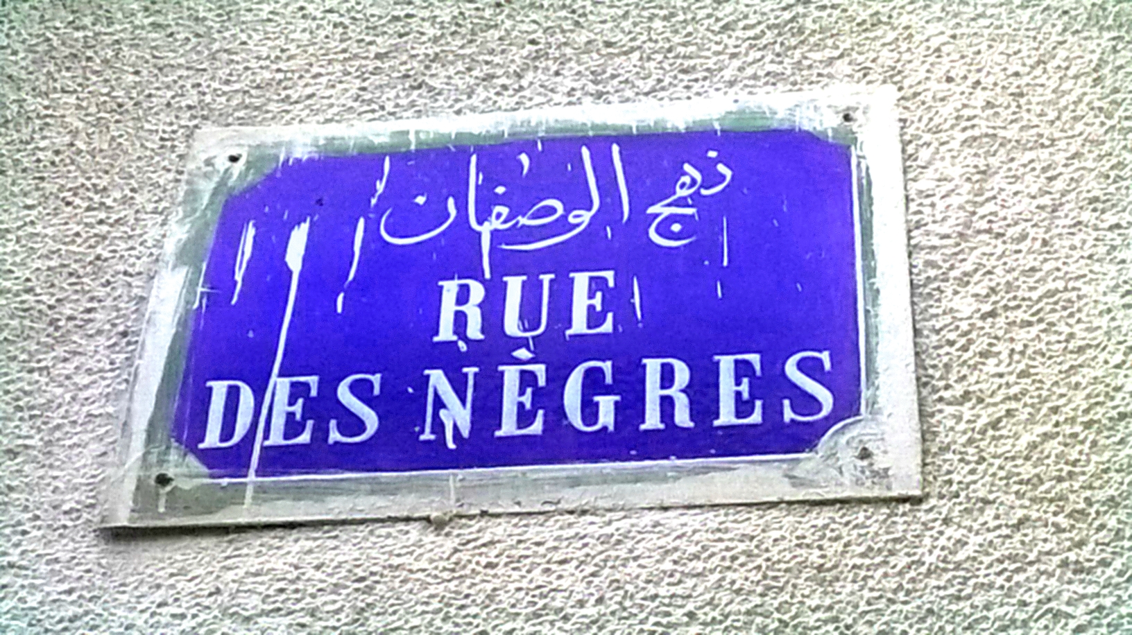 La médina de Tunis مدينة تونس العتيقة